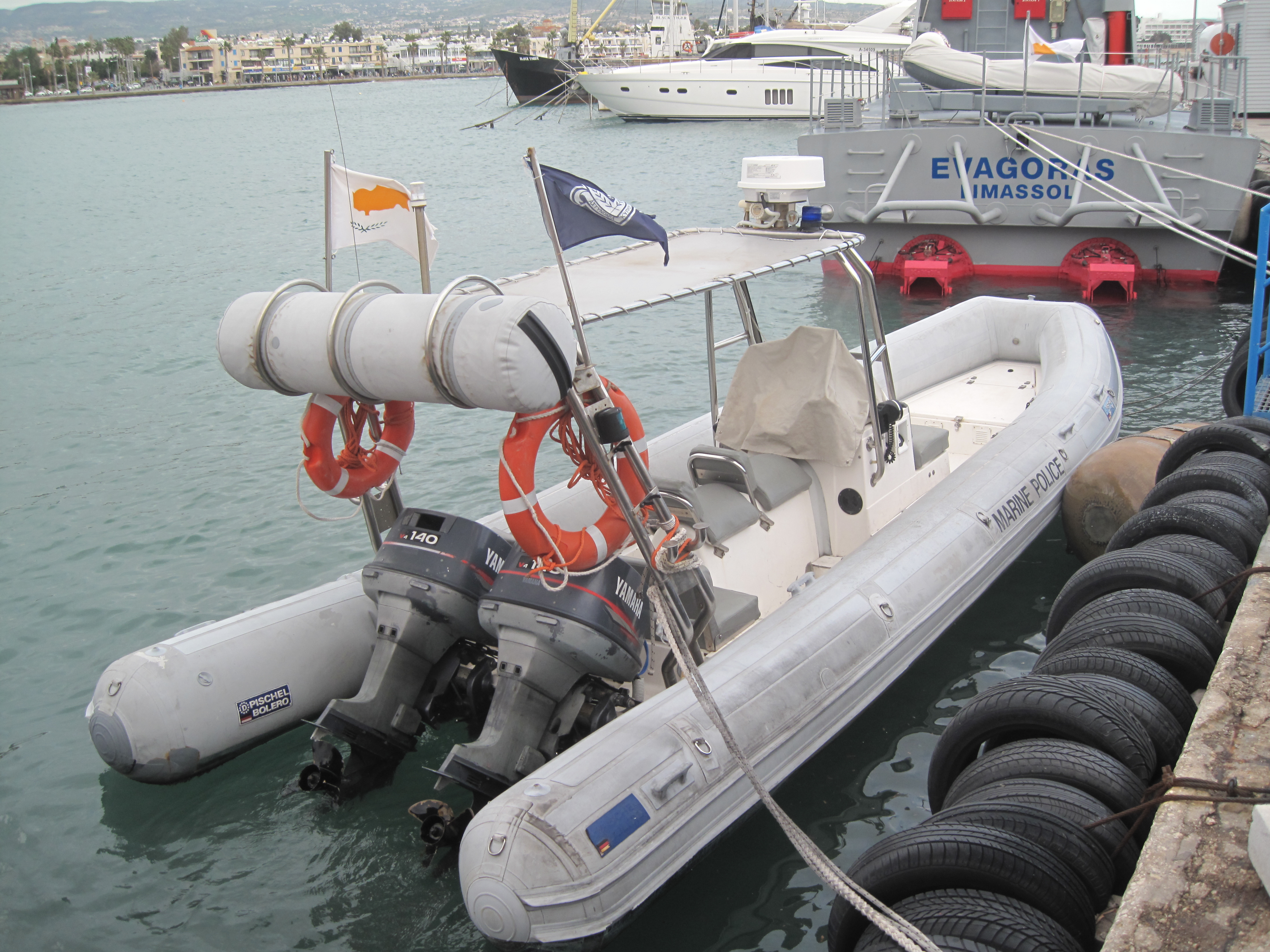 politieboot van Cyprus